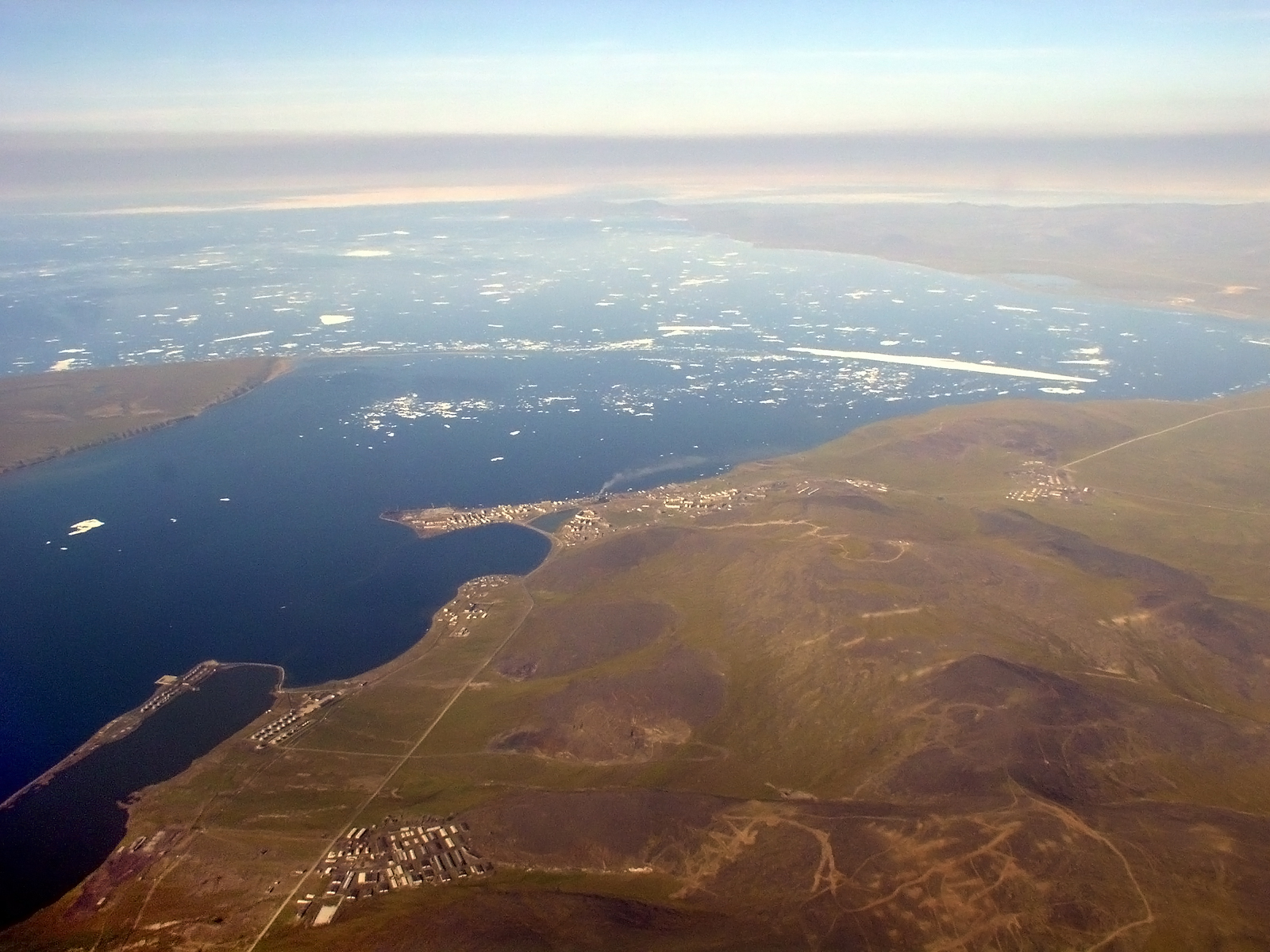 Категория:Города России